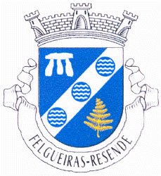 BRASÃO Escudo de azul, barra de prata de prata carregada de três fontes heráldicas, acompanhada em chefe de uma anta arqueológica de prata e, em ponta, de um ramo de feto de ouro Coroa Mural: De prata de três torres Listel: Branco, com a legenda a negro: "FELGUEIRAS - RESENDE